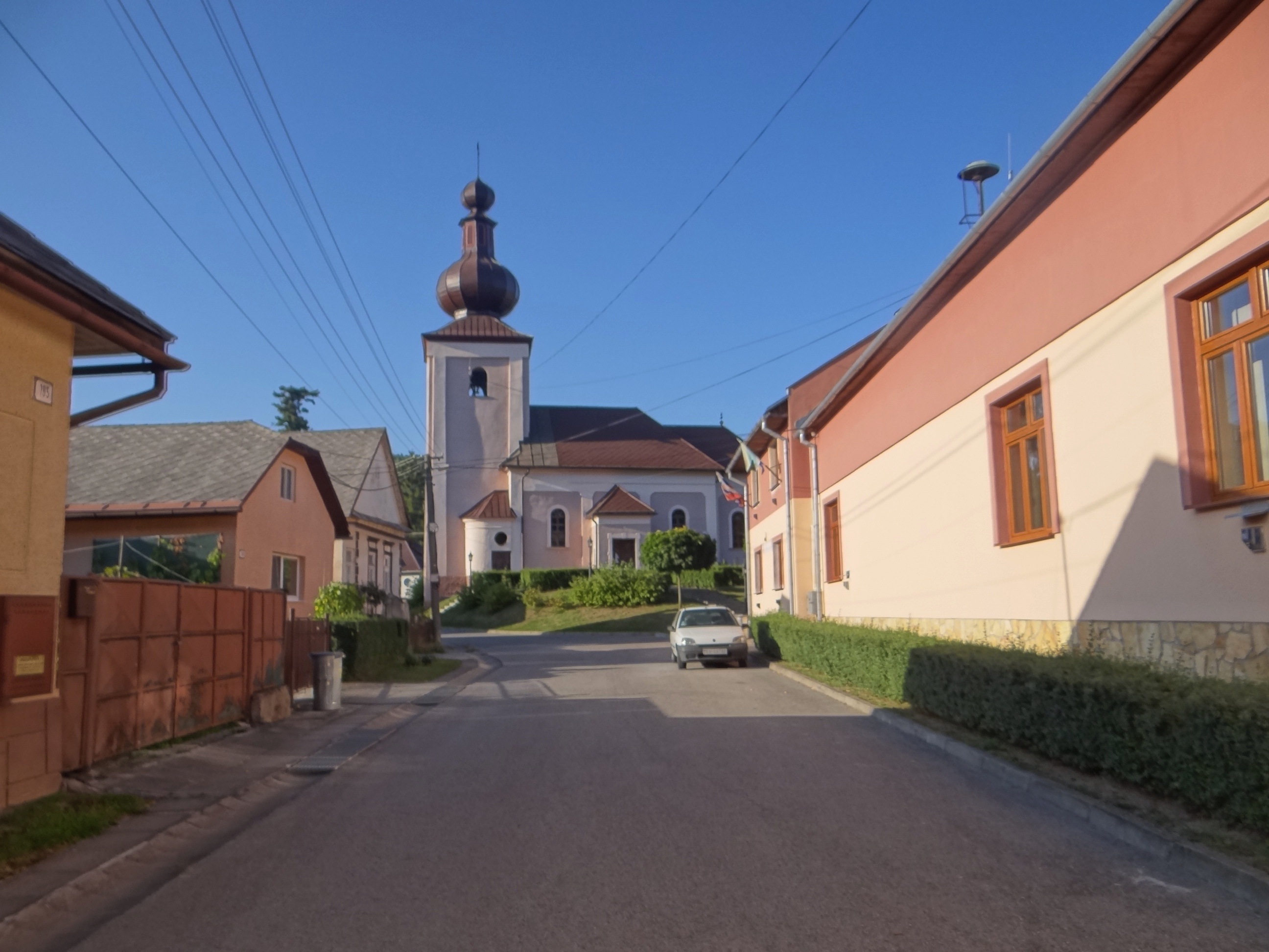 Mokrá Lúka